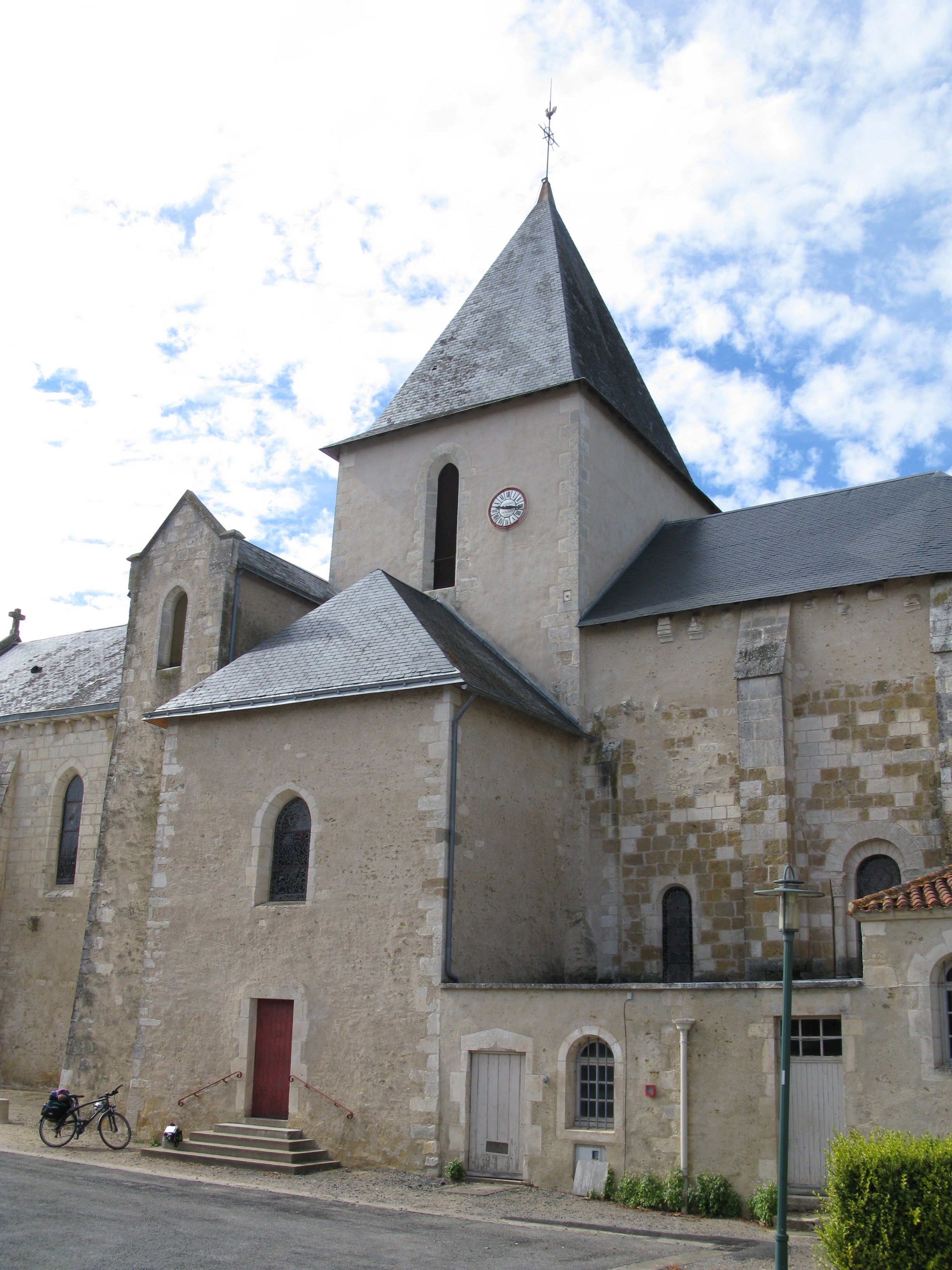 Église de Moutiers-sur-le-Lay